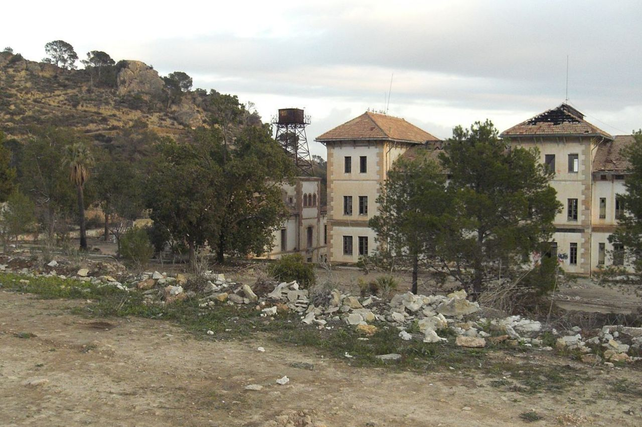 Aigües (Alacantí). Antic centre infantil de turbeculossos.